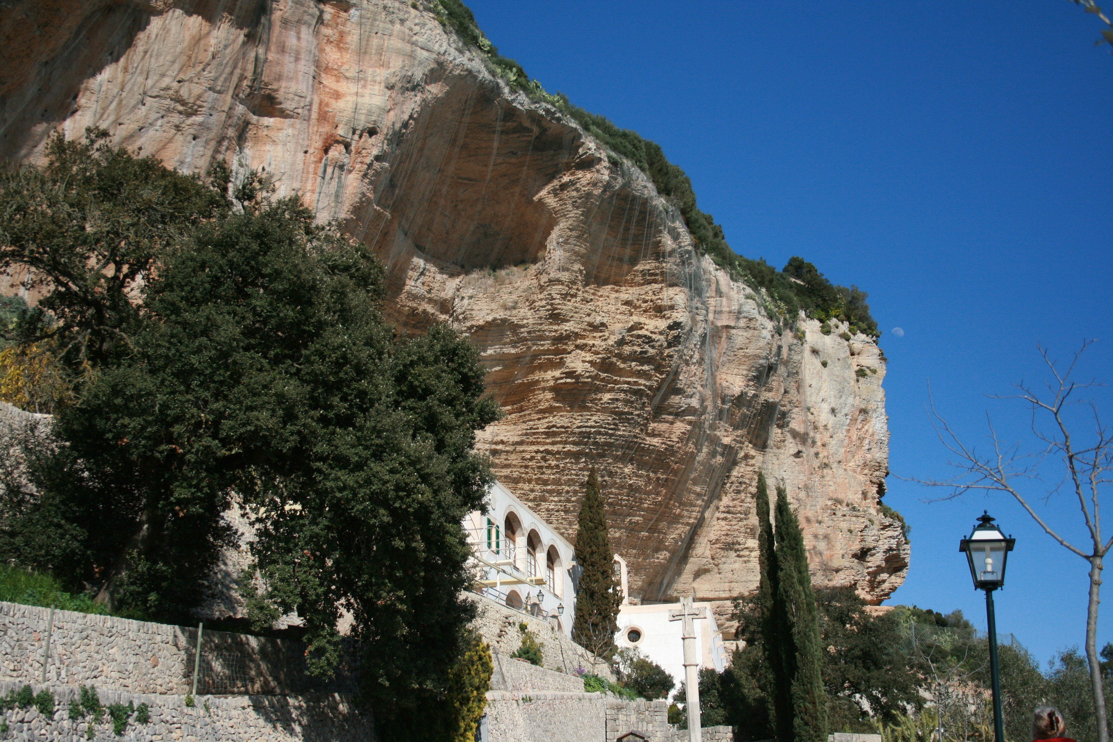 Santuari de Nostra Senyora de Gràcia, Puig de Randa in Algaida, Mallorca